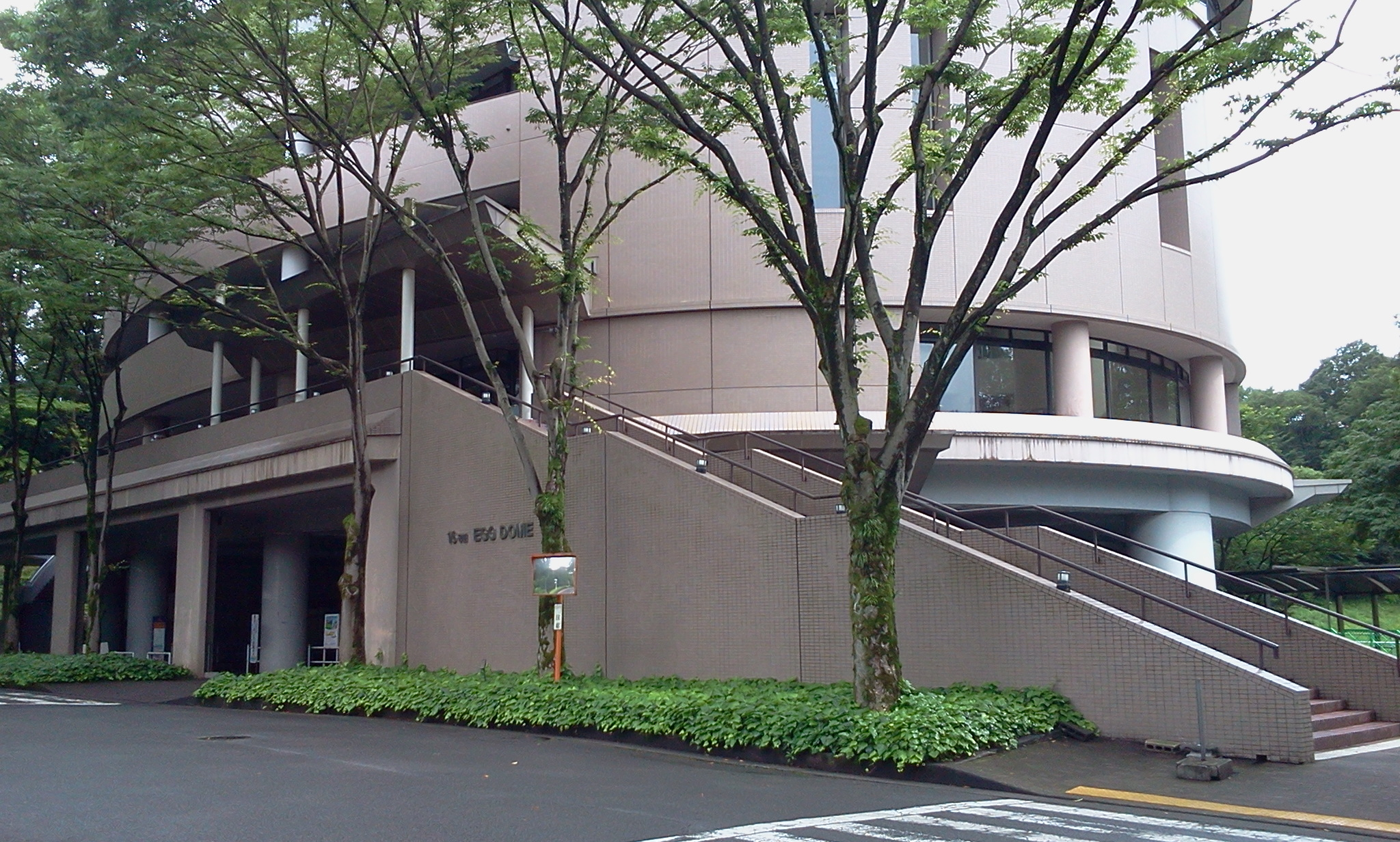 法政大学多摩キャンパスEGG DOME